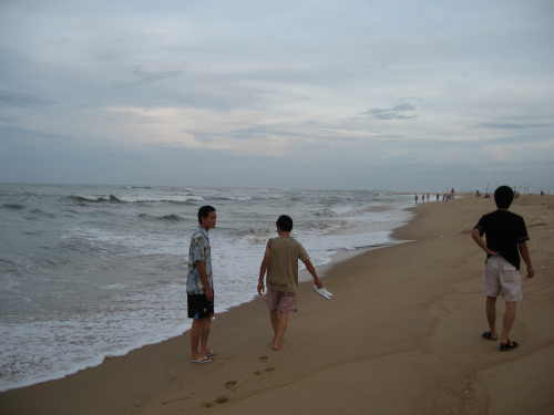 Nhat Le Beach in Dong Hoi, Quang Binh, Vietnam